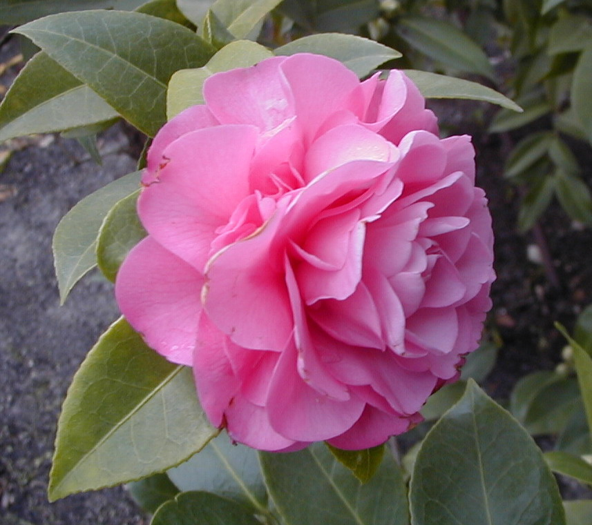 Camellia x williamsii 'Debbie'. Real Jardín Botánico, Madrid, España.